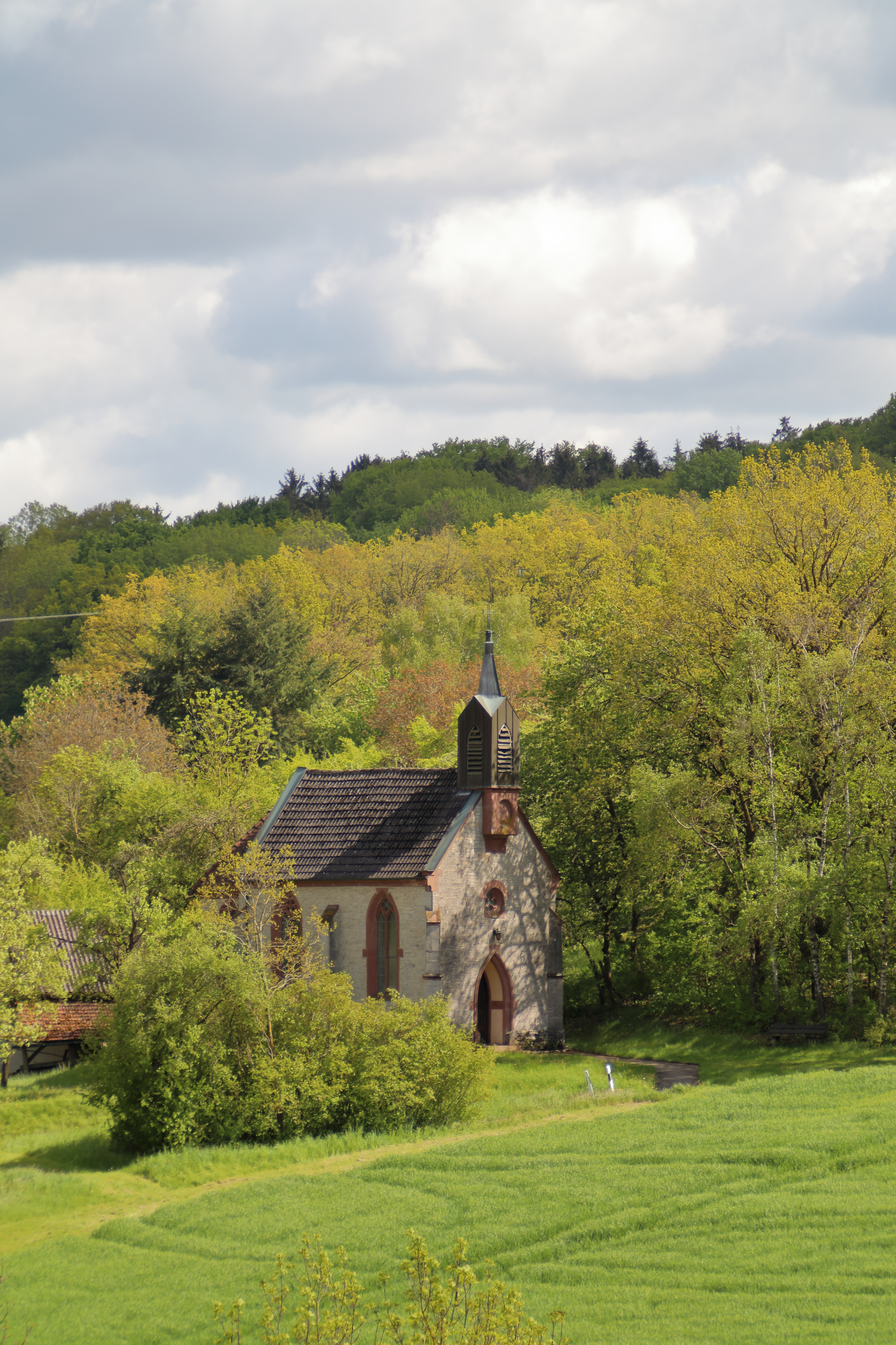 Die Kapelle Maria Heimsuchung im Igersheimer Ortsteil Harthausen, im Weiler Neubronn Hs.Nr. 10.